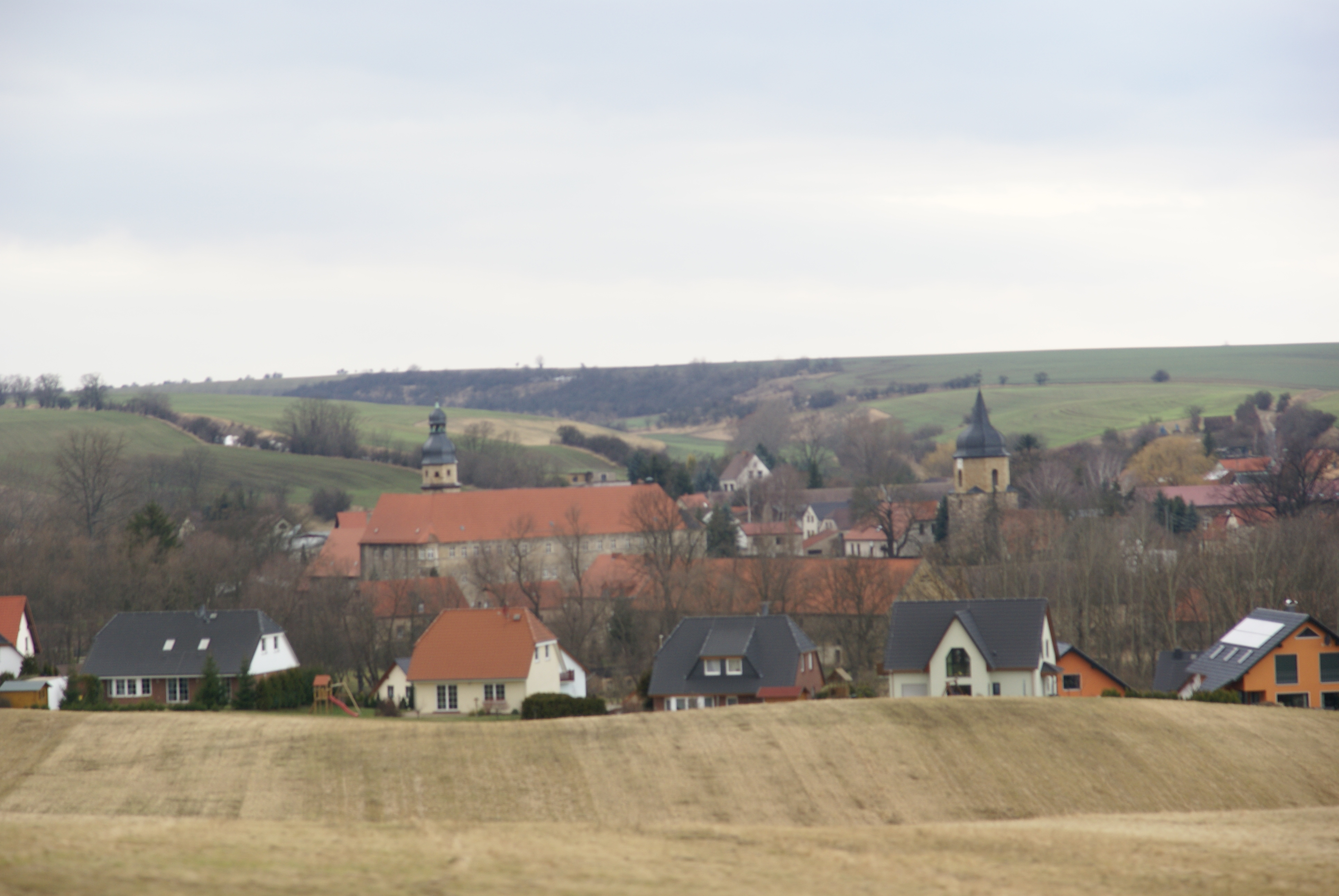 Blick auf Schochwitz von Osten